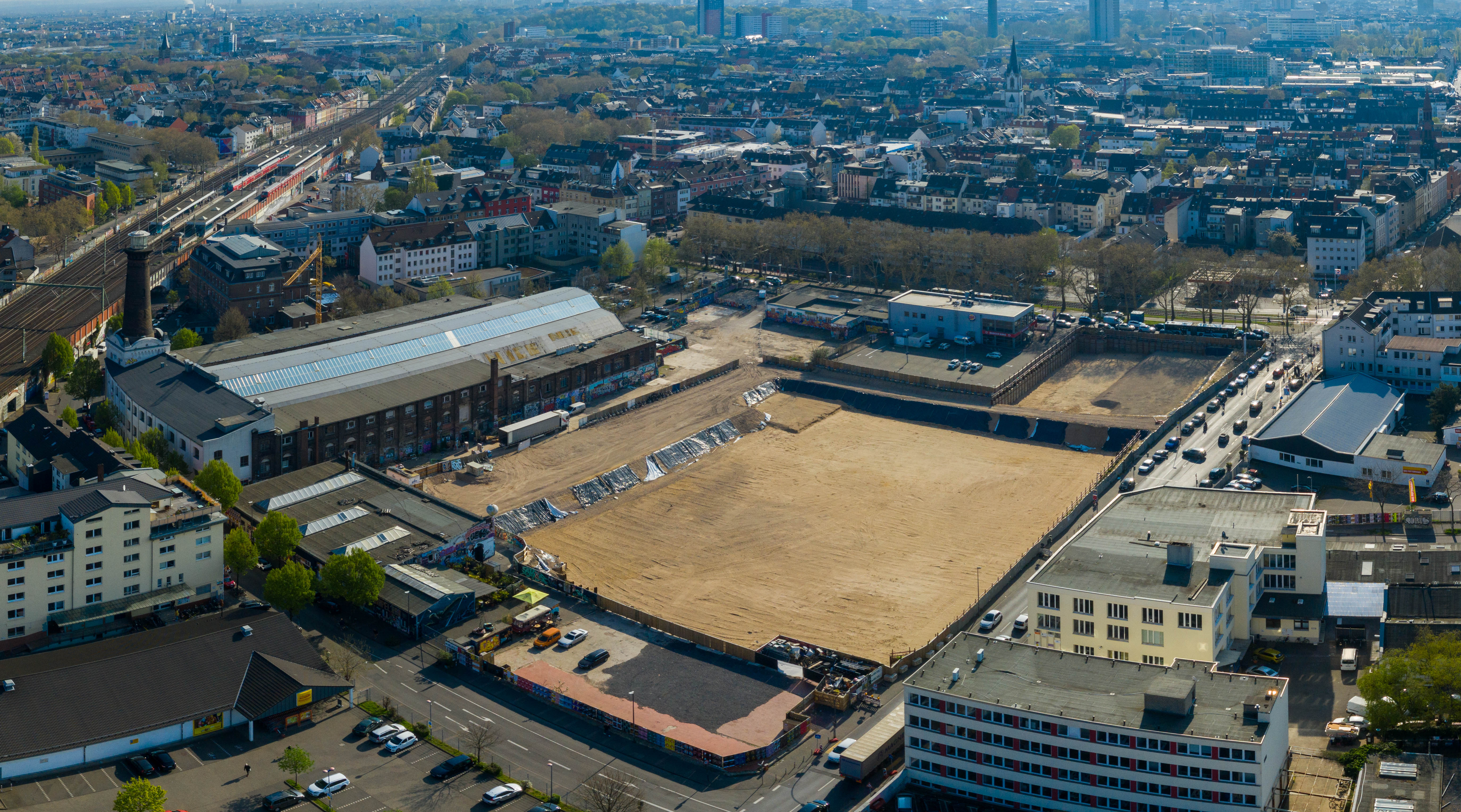 Helios-Gelände - Köln-Ehrenfeld - Baugrube für den geplanten Neubau einer Schule, April 2019